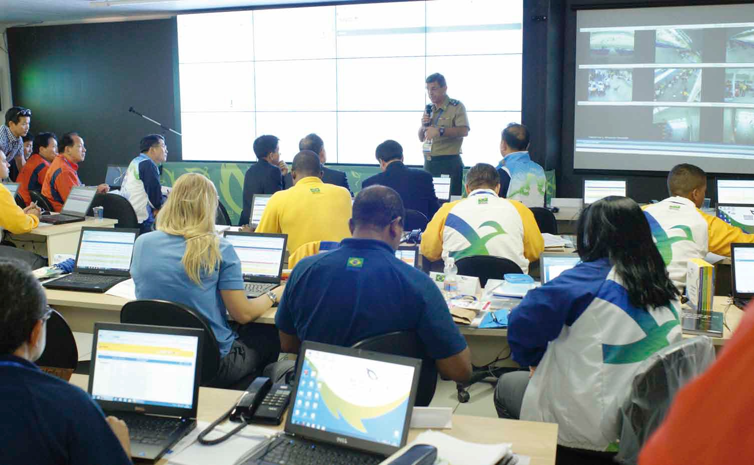 O CIOC foi concebido para ser o centro de comando e controle da execução dos Jogos, empregando recursos de hardware e software que permitiram o acompanhamento da execução das atividades previstas para todas as instalações esportivas e não esportivas, bem como registrar e acompanhar a solução de incidentes.